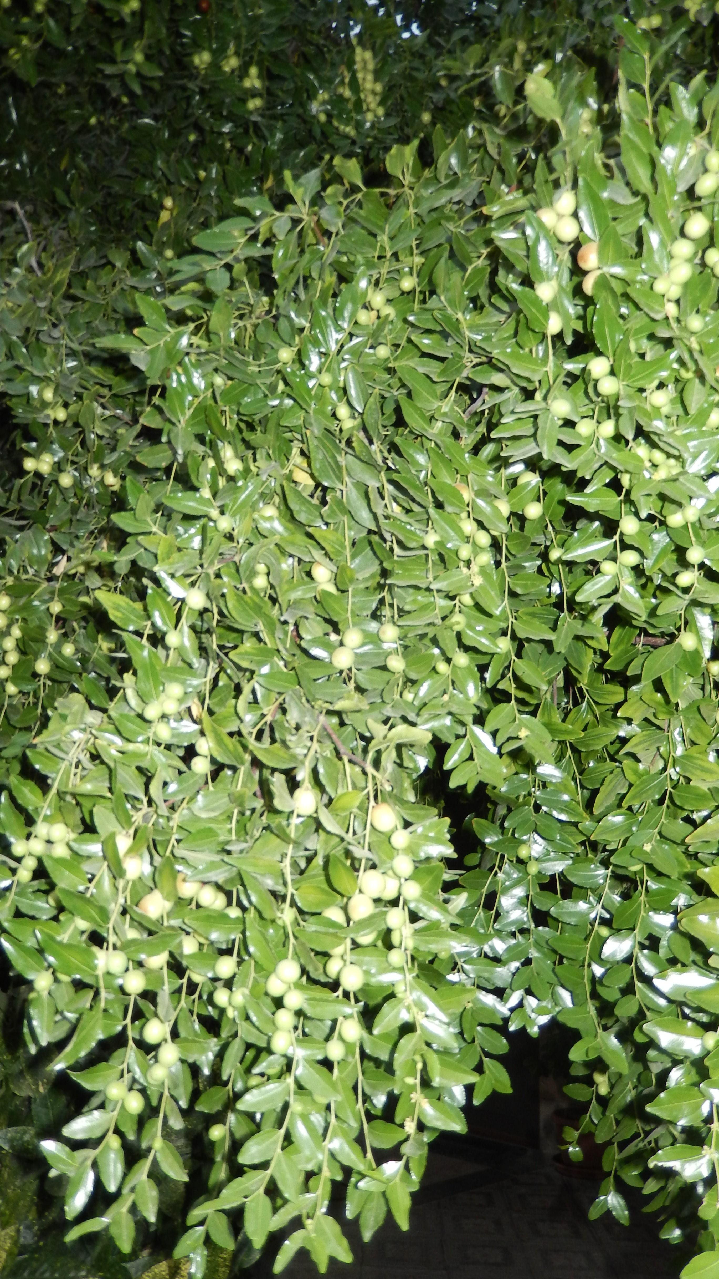 Ziziphus, Ունաբի պտուղները